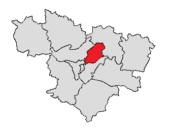 Localisation du canton d'Agen-Nord-Est